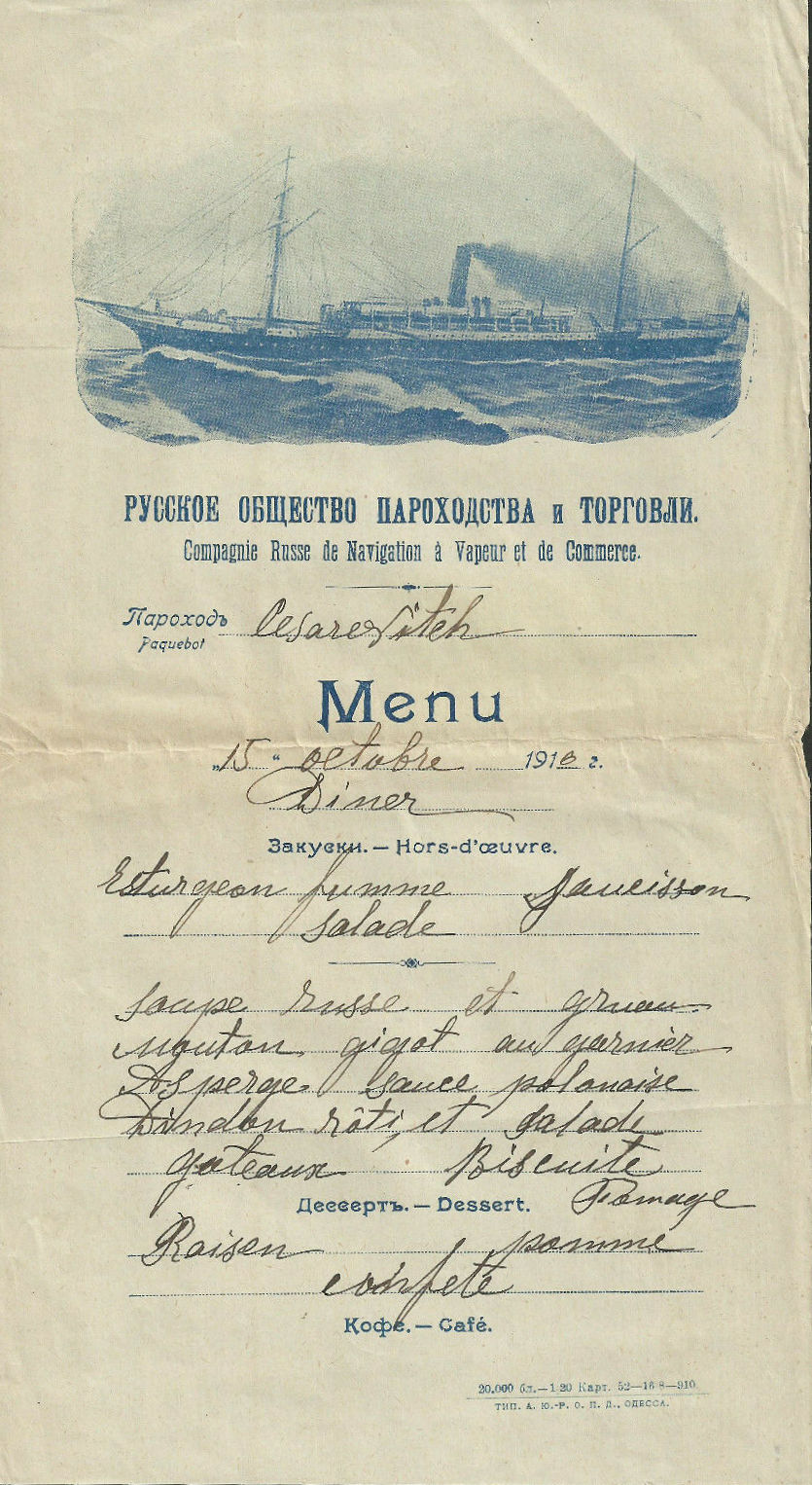 Abbildung einer handausgefüllten Speisekarte für das Diner vom 15. Oktober 1916, Reederei: ROPiT, SS Zesarewitsch